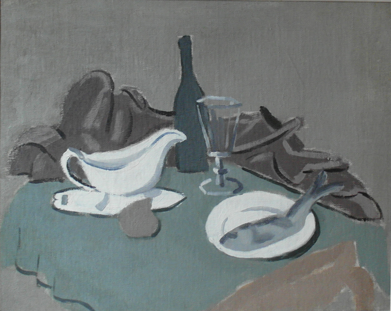 А. Блюменфельд. Натюрморт с белым соусником. 1918. Х., м., 52х66